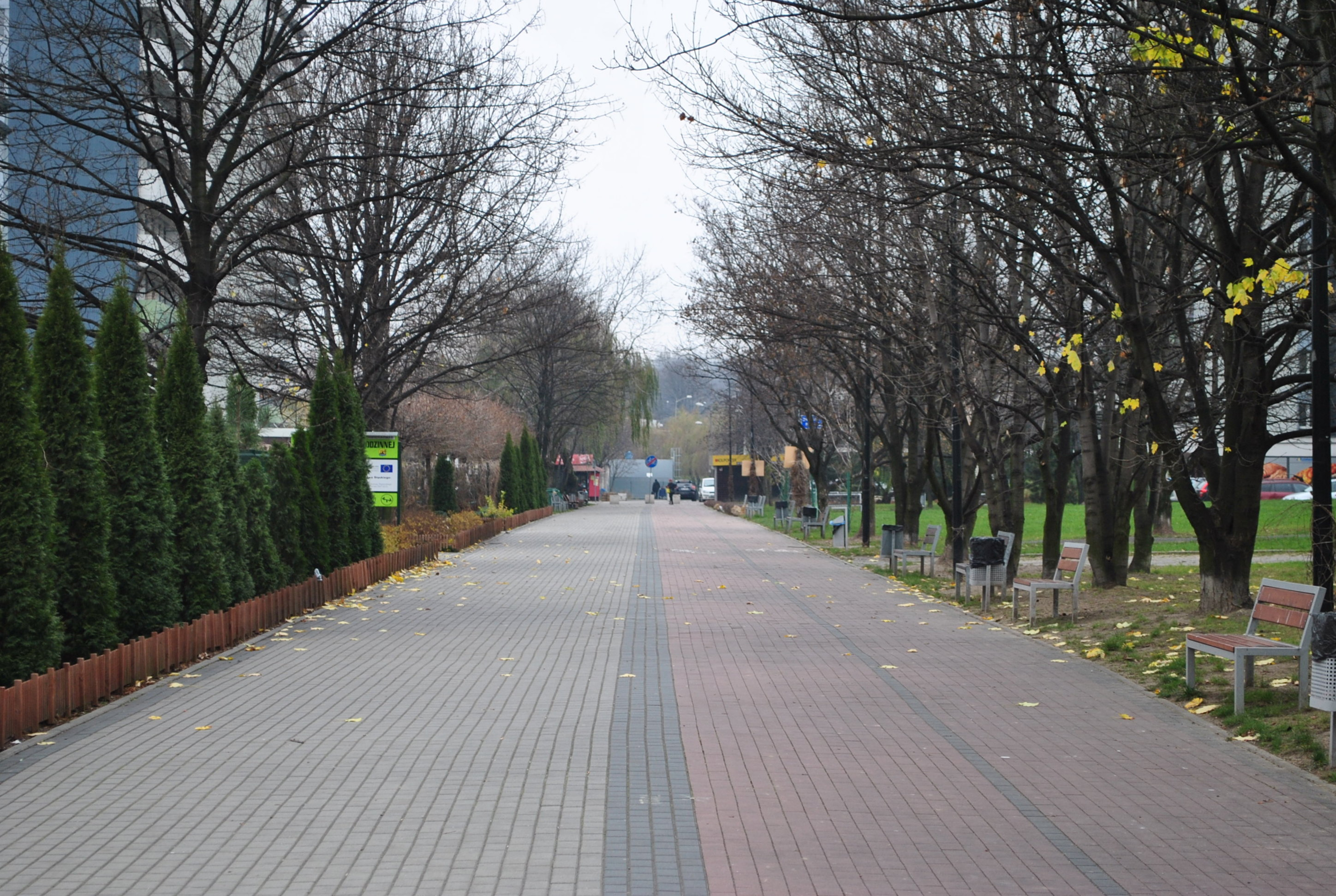 Katowice, Osiedle Tysiąclecia. Aleja Księżnej Jadwigi Śląskiej (widok w kierunku północno-zachodnim